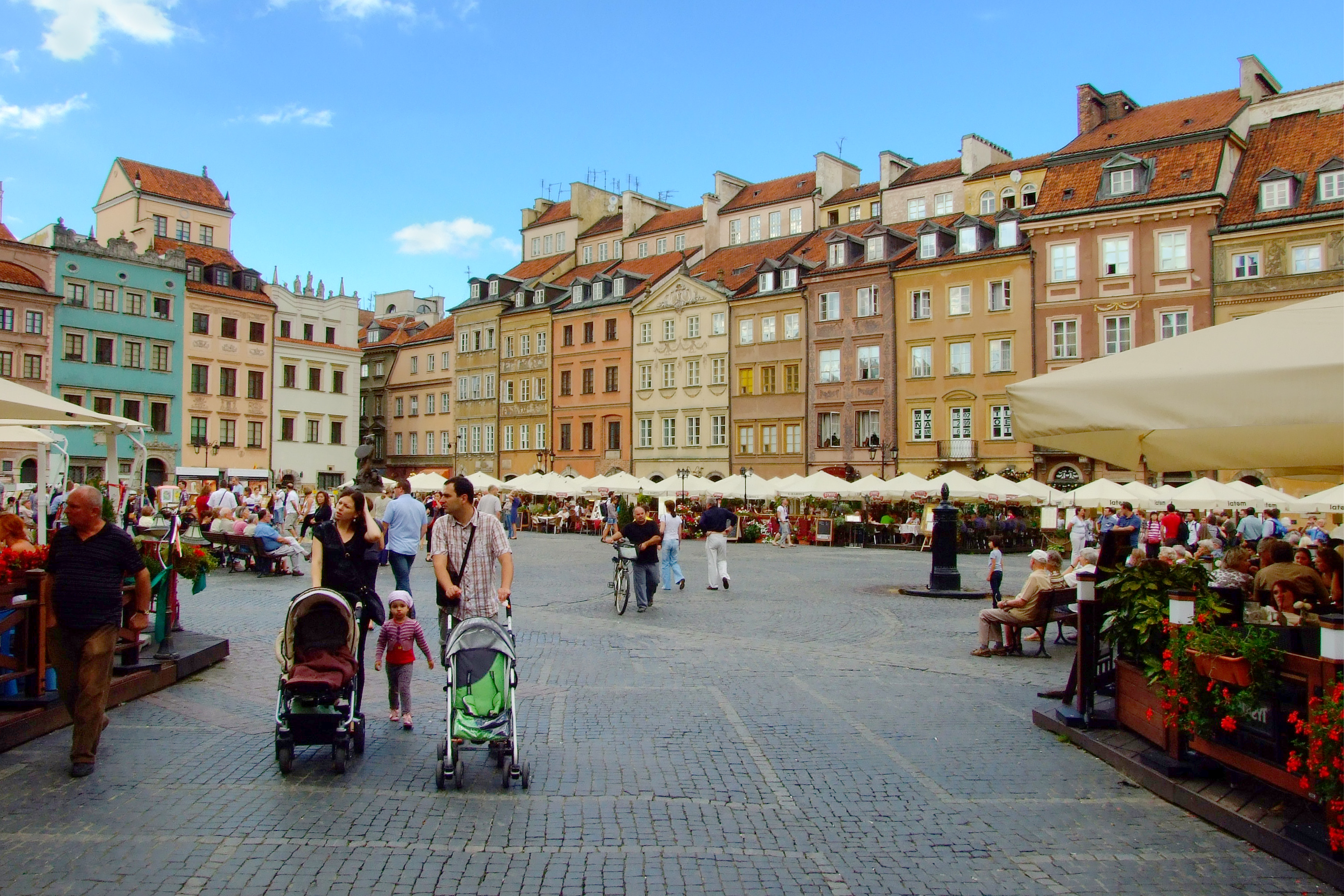 Rynek Starego Miasta w Warszawie